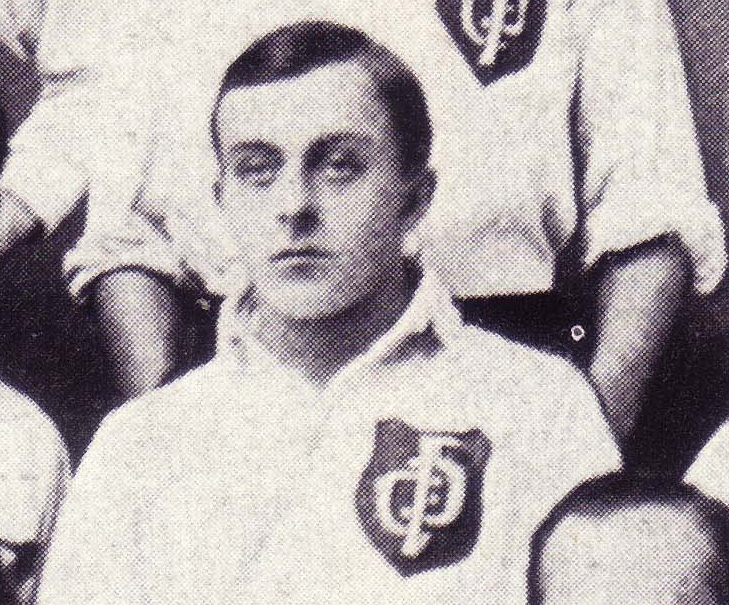 Ladislaus Kurpiel im Team des DFC Prag